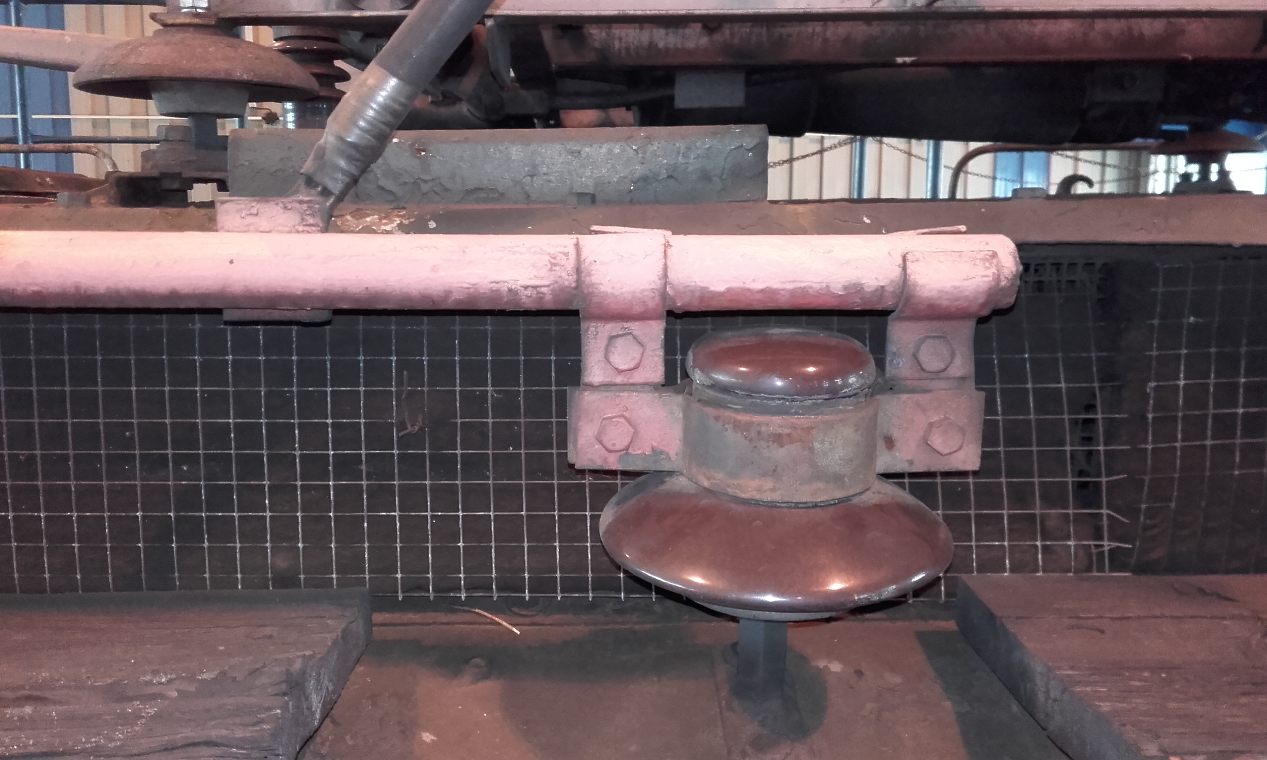 Střecha 141.012 - podpěrný izolátor a připojení sběrače